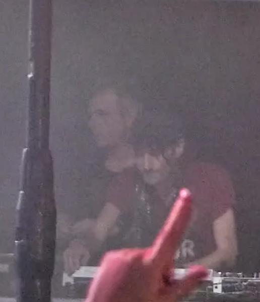 3D (Danny Howells, Dave Seaman, Darren Emerson). A felvétel 2017. december 31-én, Szilveszter napján készült a Millenáris B épületében. 3D (Danny Howells, Dave Seaman, Darren Emerson) és Anthony Pappa DJ elektronikus zenéje